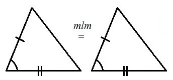 Trijstūru vienādības pazīme mlm